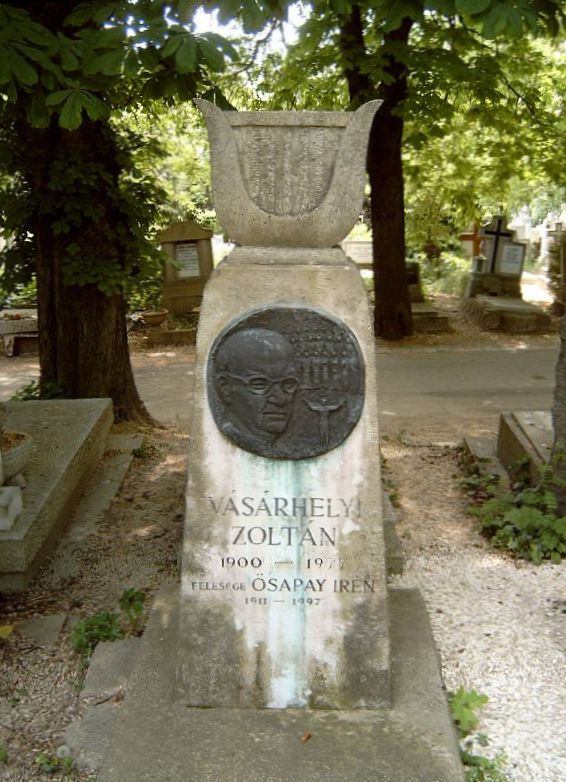 Vásárhelyi Zoltán (Kecskemét, 1900. március 2. – Budapest, 1977. január 27.) kóruskarnagy, zeneszerző, főiskolai tanár sírja Budapesten. Farkasréti temető: 25-1-74 [szobrász: Szabó Iván].